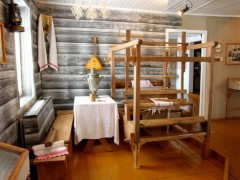 Інтэр'ер Літаратурнага музея Кузьмы Чорнага ў Цімкавічах. Ткацкі станок. Фота з сайта Дзяржаўнага музея гісторыі беларускай літаратуры